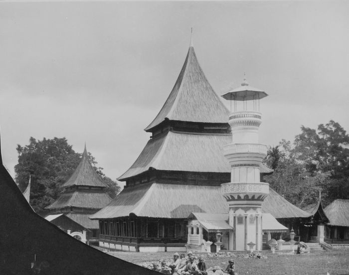 foto. Kinderen voor een moskee en minaret in Kotabaroe bij Fort de Kock